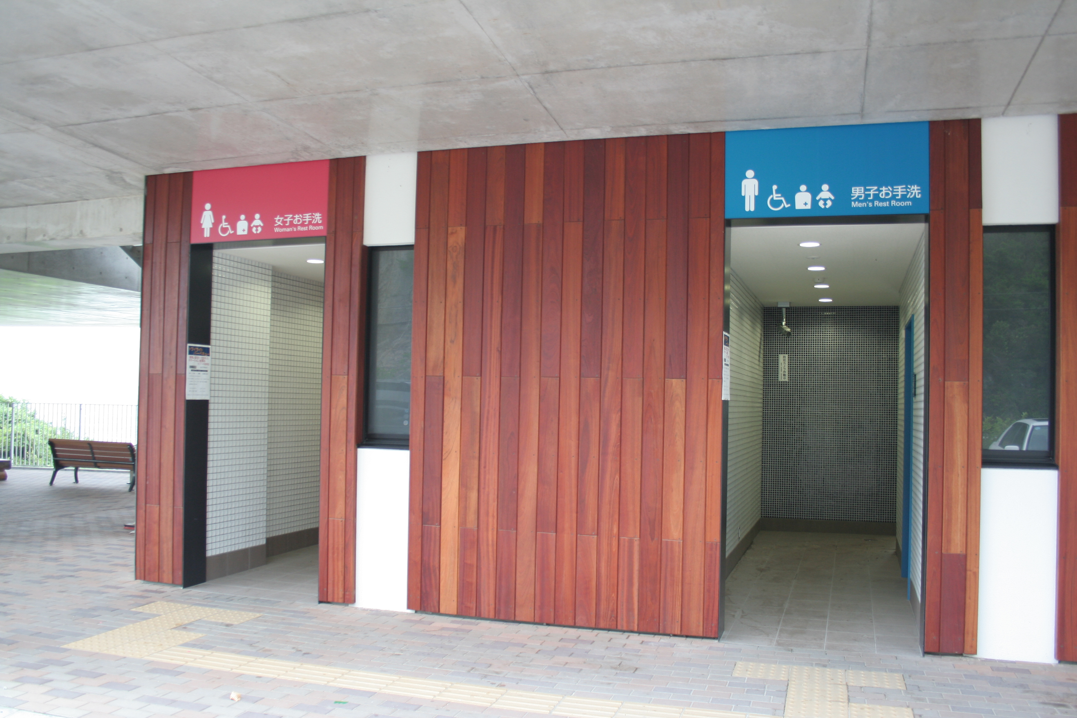 道の駅みつ。兵庫県たつの市御津町にある道の駅。国道250号線の七曲りと呼ばれる区域の側にある。 道の駅内にあるトイレへの出入り口。